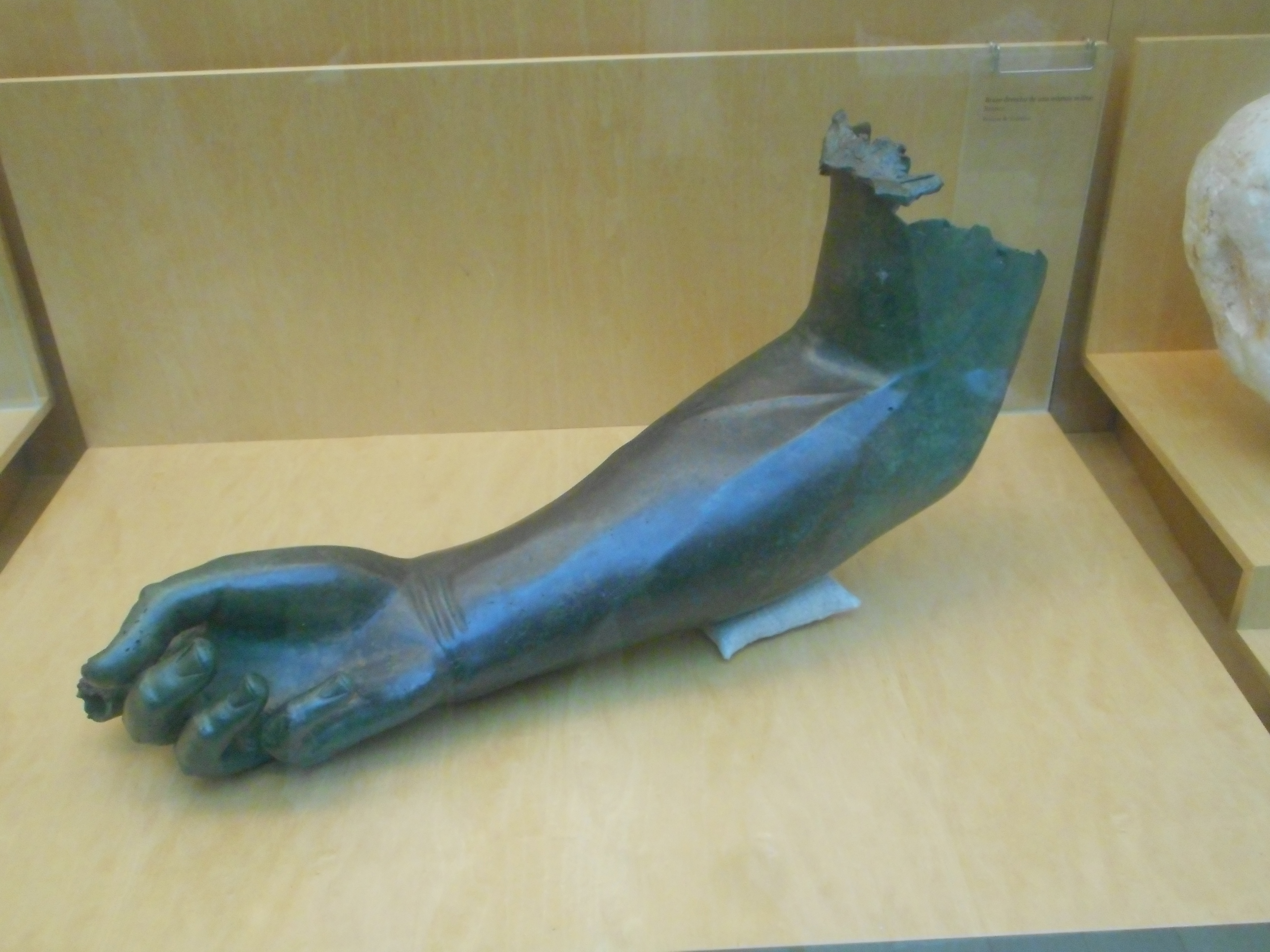 Brazo de bronce, resto de una estatua imperial del siglo II, procedente de los principia del campamento del ALA II Flavia Hispanorum en petavonium (Rosinos de Vidriales, Zamora, España) depositada en el Museo de Zamora